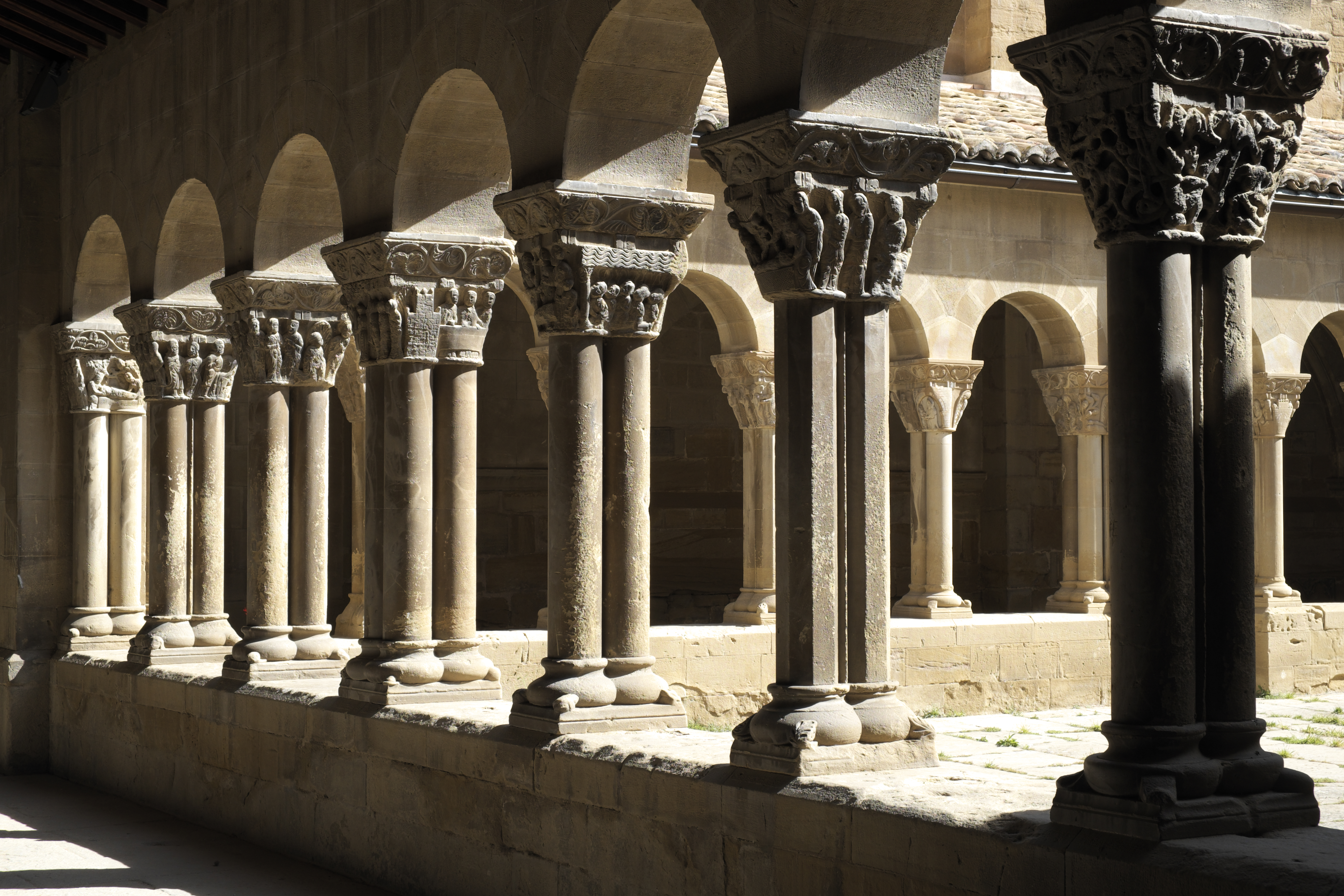 Ehemaliges Benediktinerkloster San Pedro el Viejo in Huesca in der Provinz Huesca (Aragón/Spanien), Kreuzgang